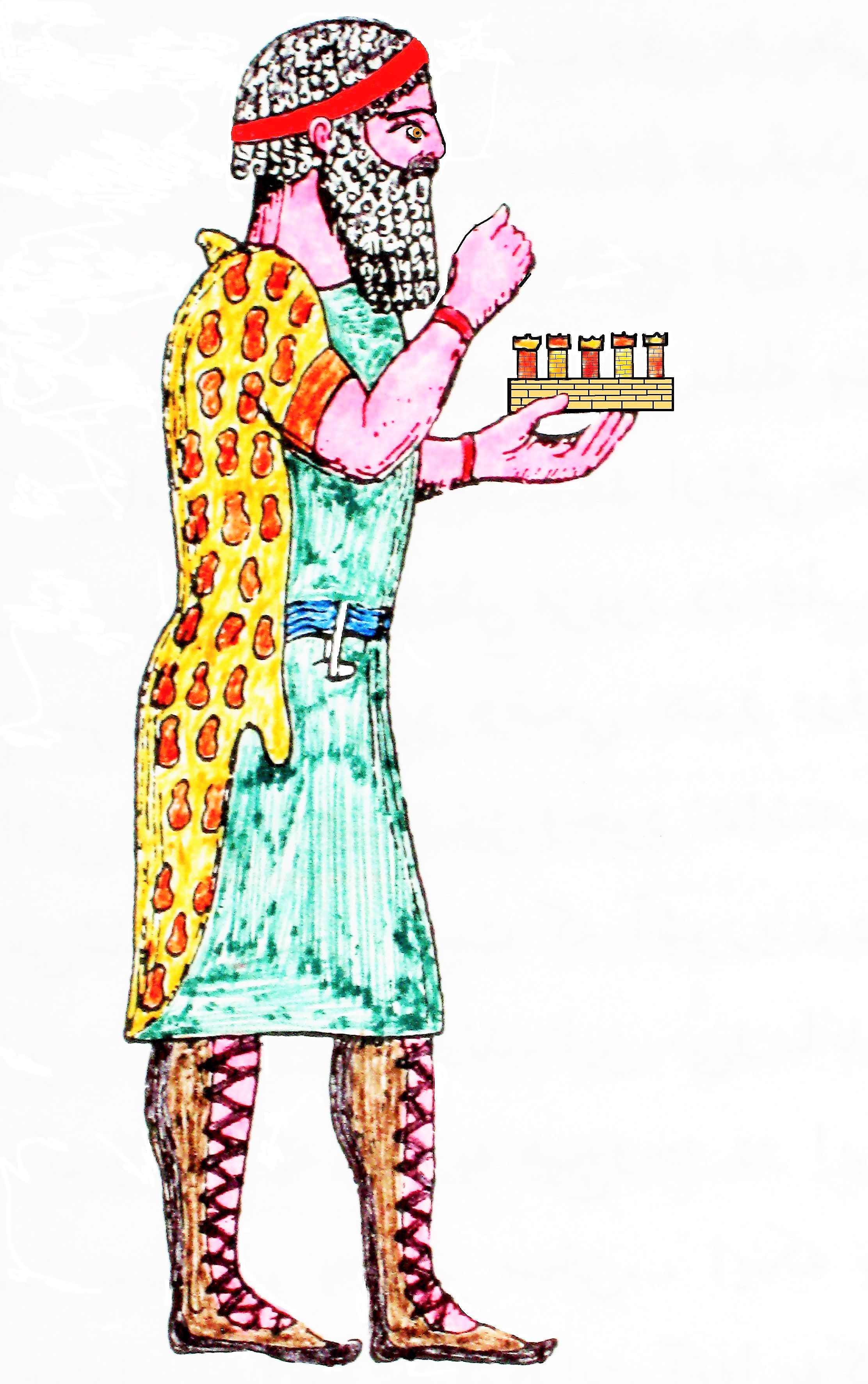 شاهک مادی با نمونه دژ خویش که به علامت فرمانبرداری تقدیم شاه بابل می‌کند. از نقش برجسته دور-شاروکین پایان قرن هشتم پ. م.